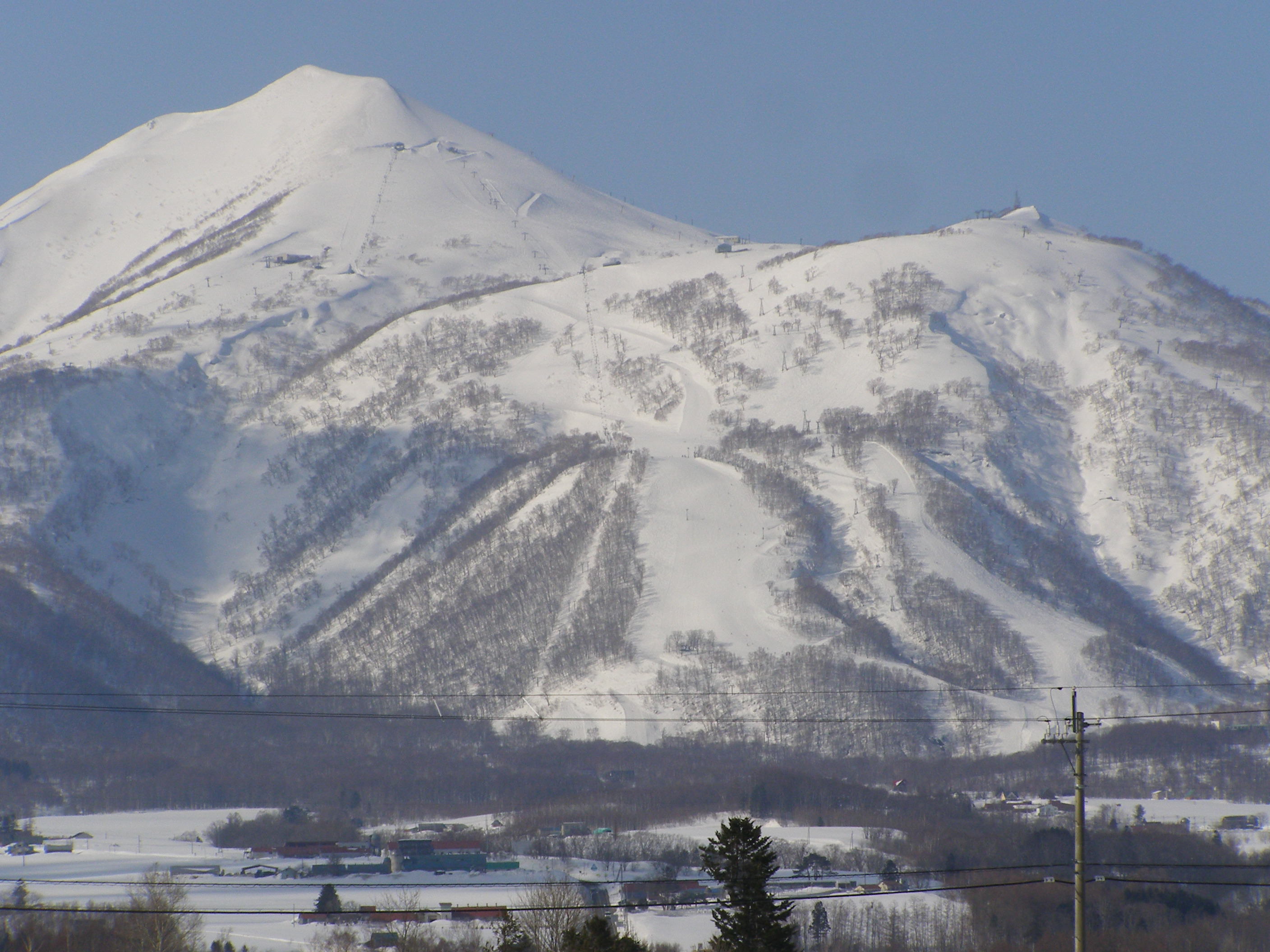 ニセコ町里見付近から望む